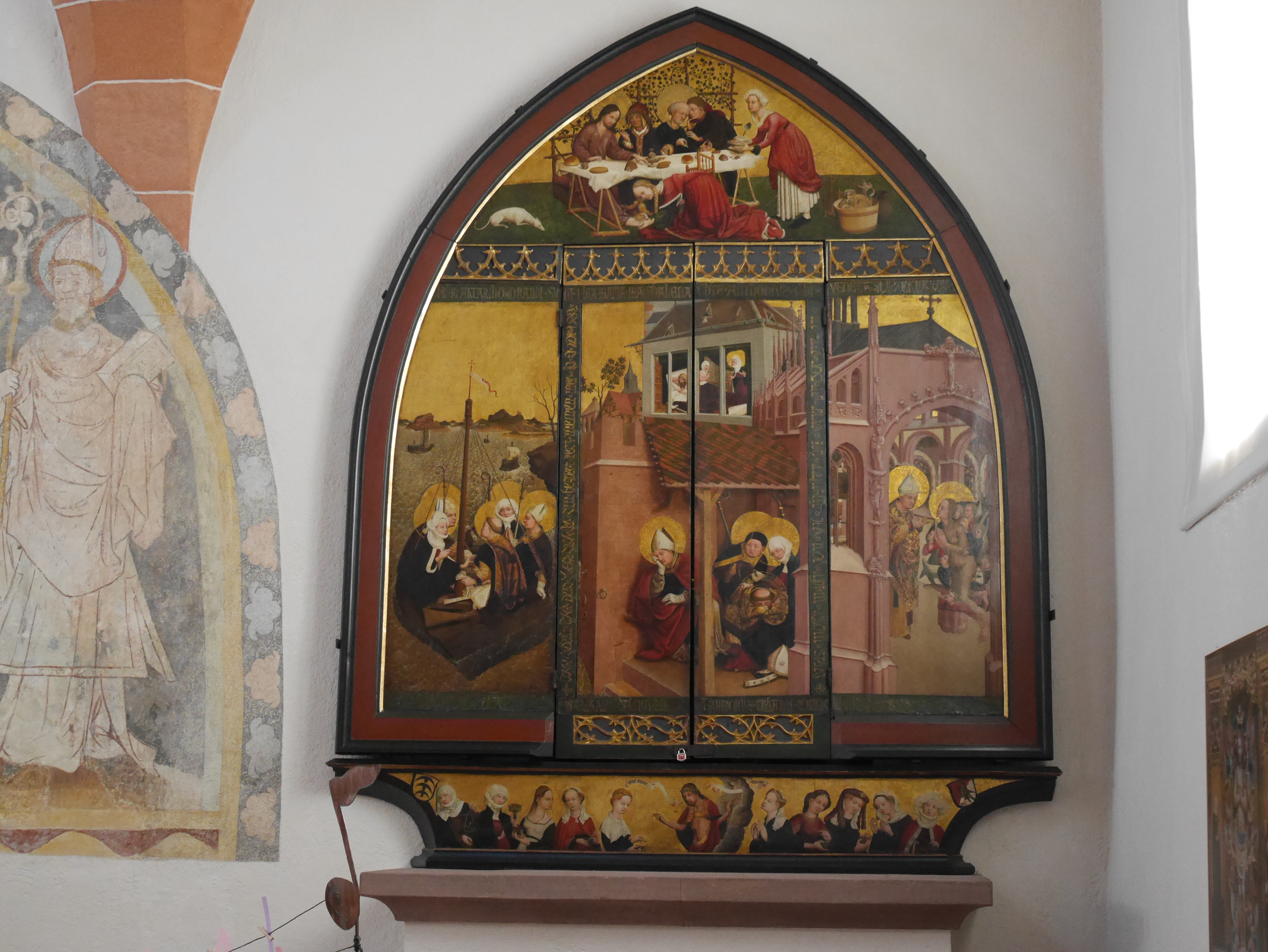 St Mary Magdalene, Tiefenbronn Moser